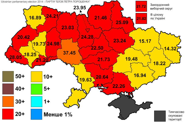 Результати виборів до Верховної Ради України, які відбулись 25 жовтня 2014 року. Інформація з офіційного сайту ЦВК. ПАРТІЯ "БЛОК ПЕТРА ПОРОШЕНКА".